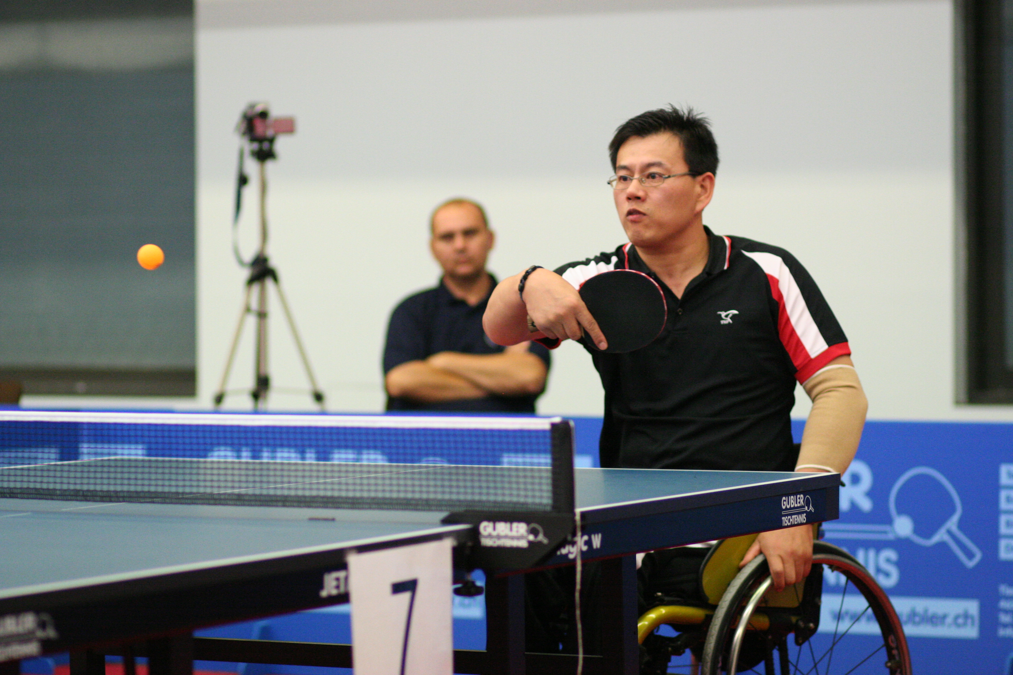 Kyoung Sik Choi (Korea)